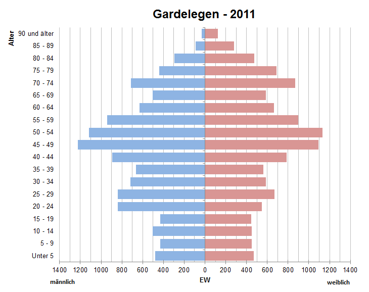 Bevölkerungspyramide der Stadt Gardelegen nach Zensus 2011.